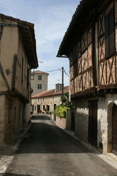 Maisons médiévales à colombages - Courrensan (Gers - France)